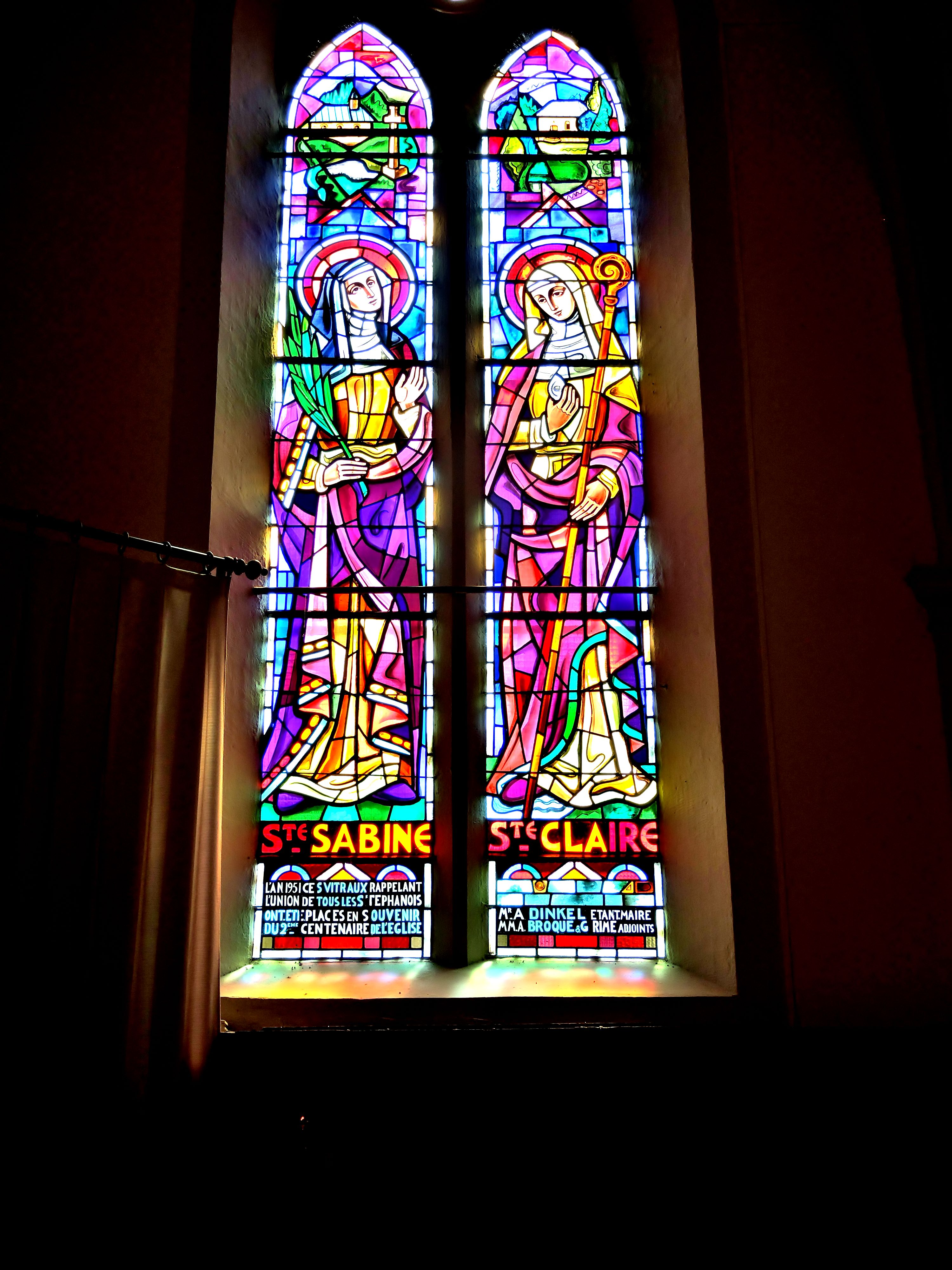 Vitraux de l'église de Saint-Etienne-lès-Remiremont (Vosges) représentant Sainte Sabine et Sainte Claire